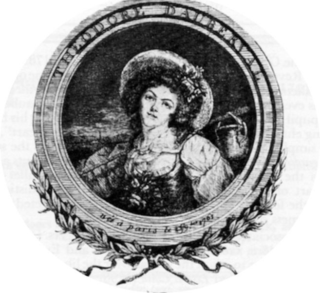 M.me Théodore Dauberval. Première ballerine à avoir interprété "La fille mal gardée"